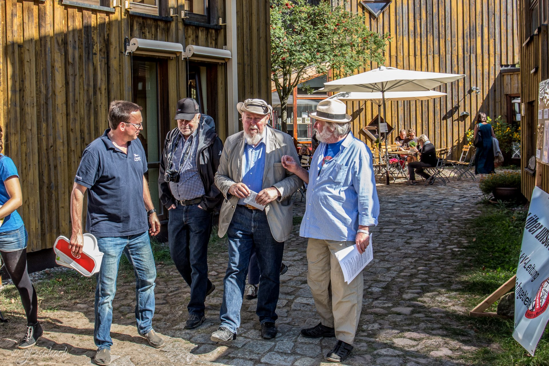 Prof. Michael Succow (Bildmitte), der Vater des ostdeutschen Nationalpark-Programms, im NABU-Erlebniszentrum Blumberger Mühle